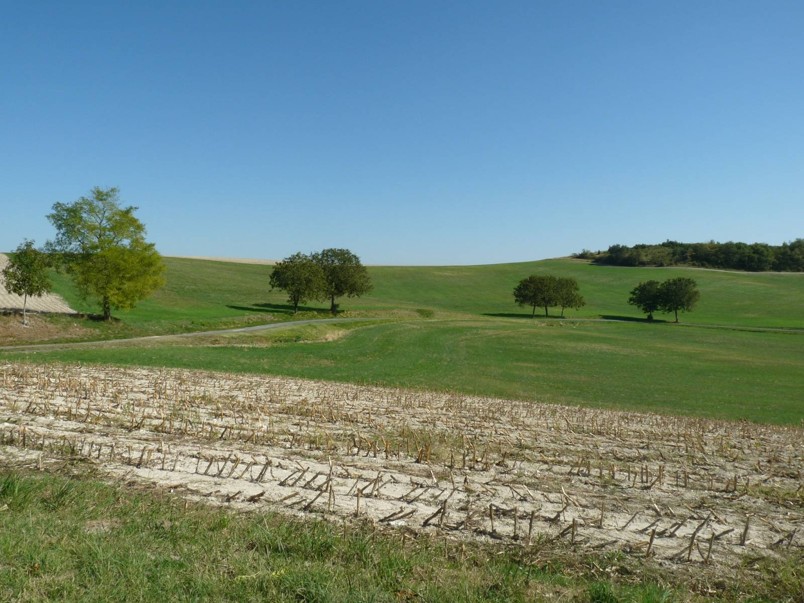 la campagne près de Vendoire (24), France